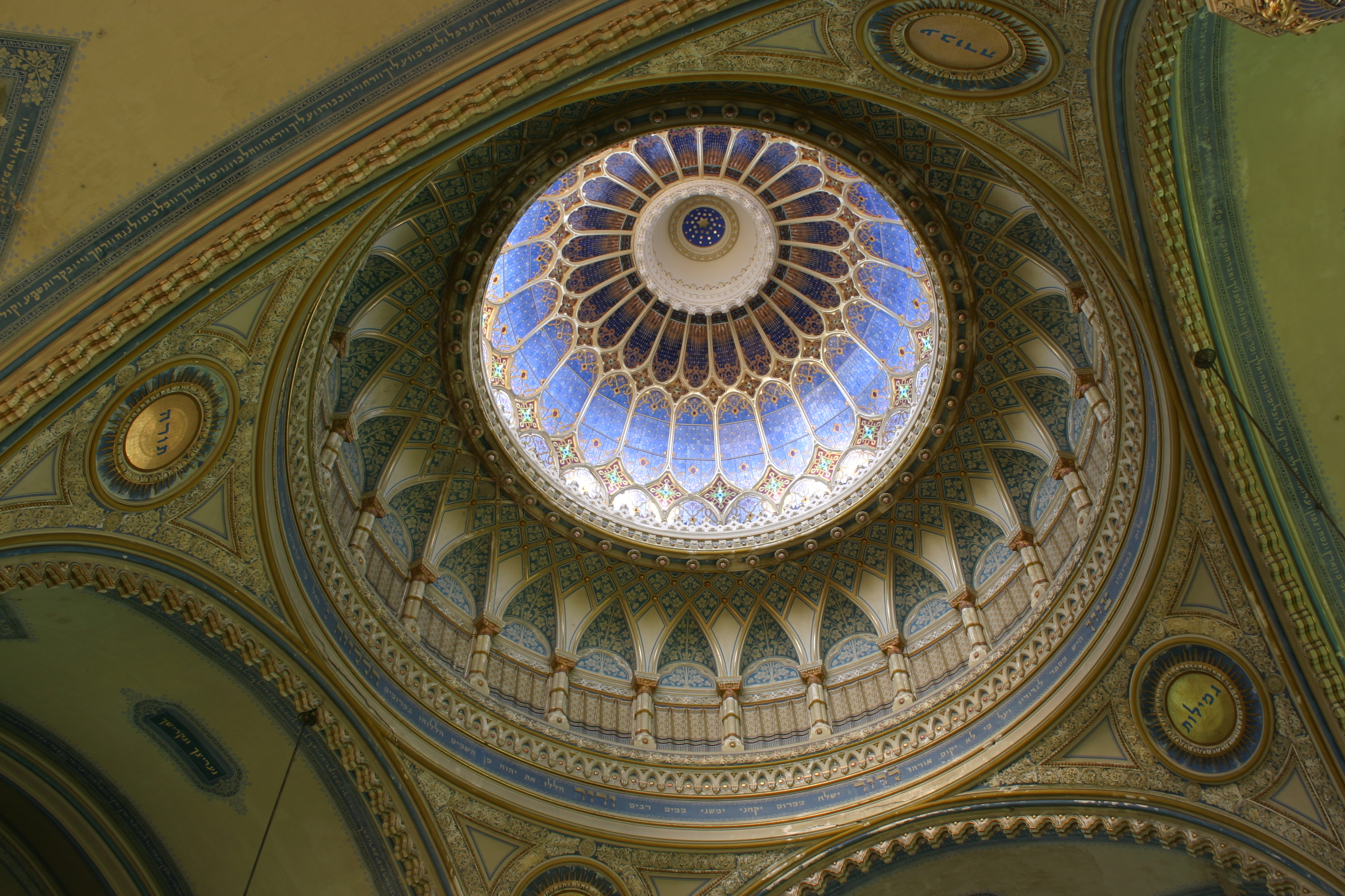 Szeged Új zsinagóga Kupolabelső Somorjai Ferenc felvétele